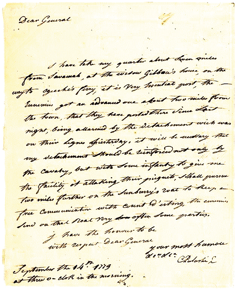 skan listu Kazimierza Pułaskiego wysłanego spod Savanah dn. 14.09.1779